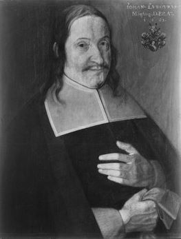 Gemälde in der Professorengalerie Tübingen